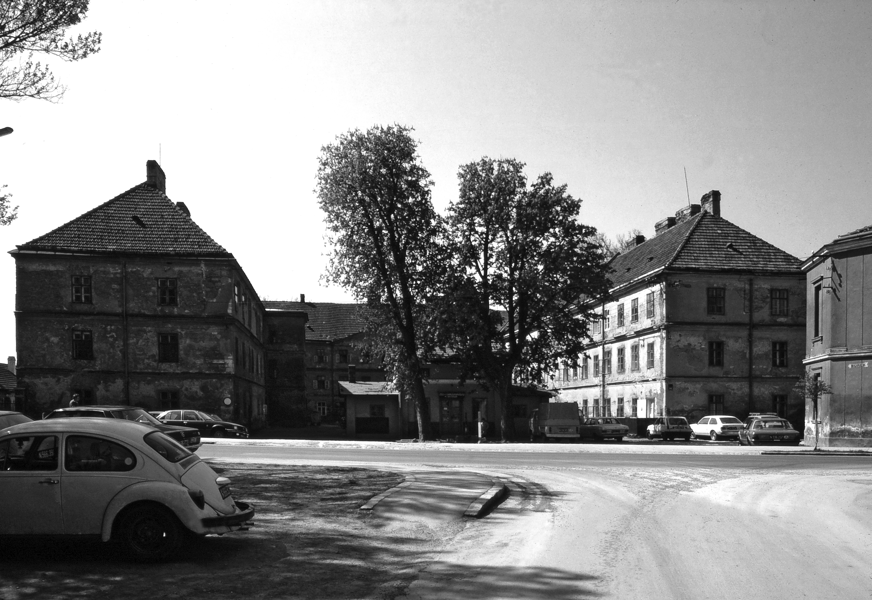 Gramatneusiedl, Marienthal, Theresienmühle um 1980 (als Wohnhaus 1845 erbaut; abgebrochen 2008, seither Wohnhausanlage Gramatneusiedl-Marienthal, Hauptstraße 64, Stiegen 1–5).